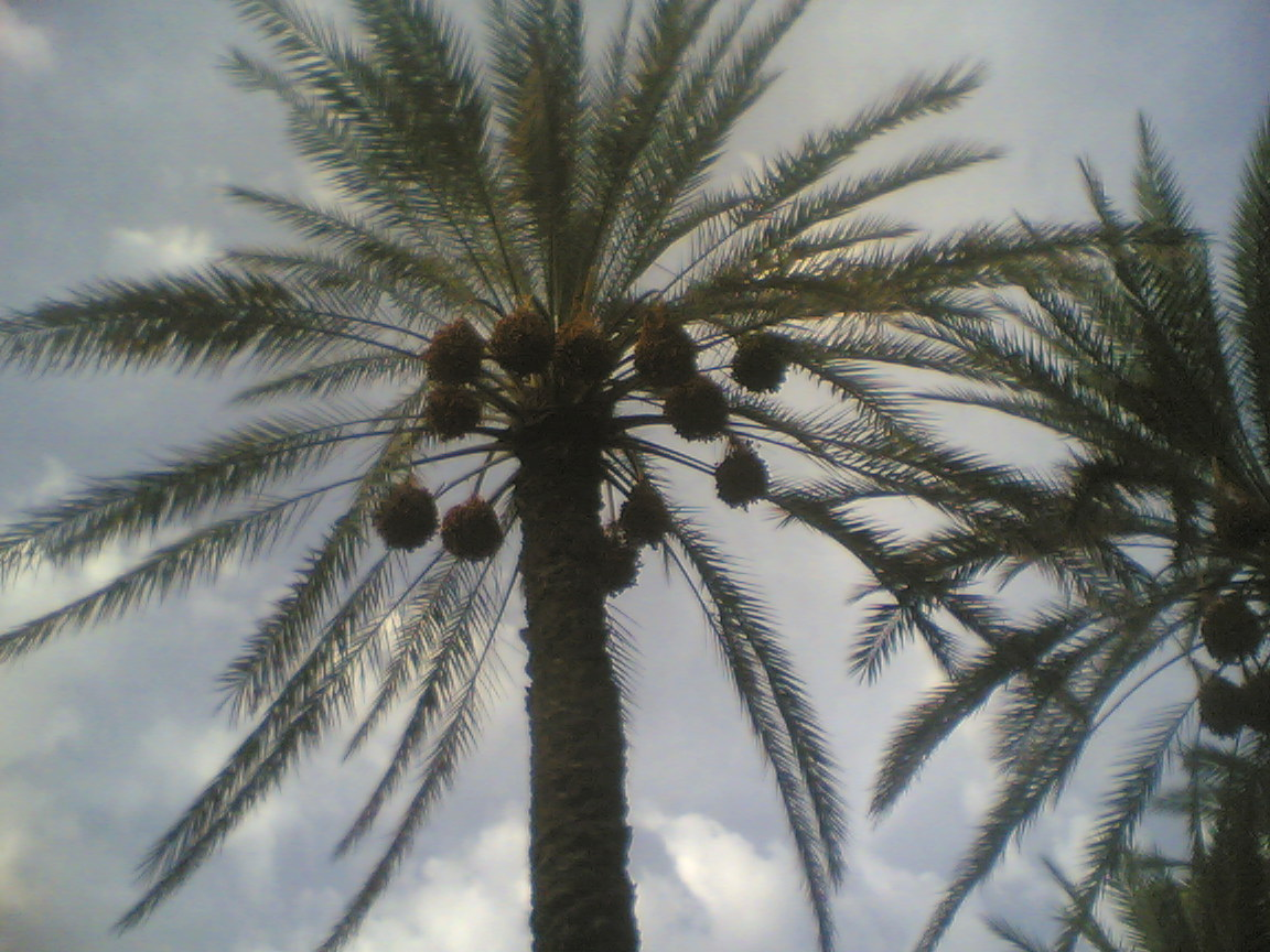 ٍٍشجرة النخيل بركان رفض .. بأرض النخيلْ